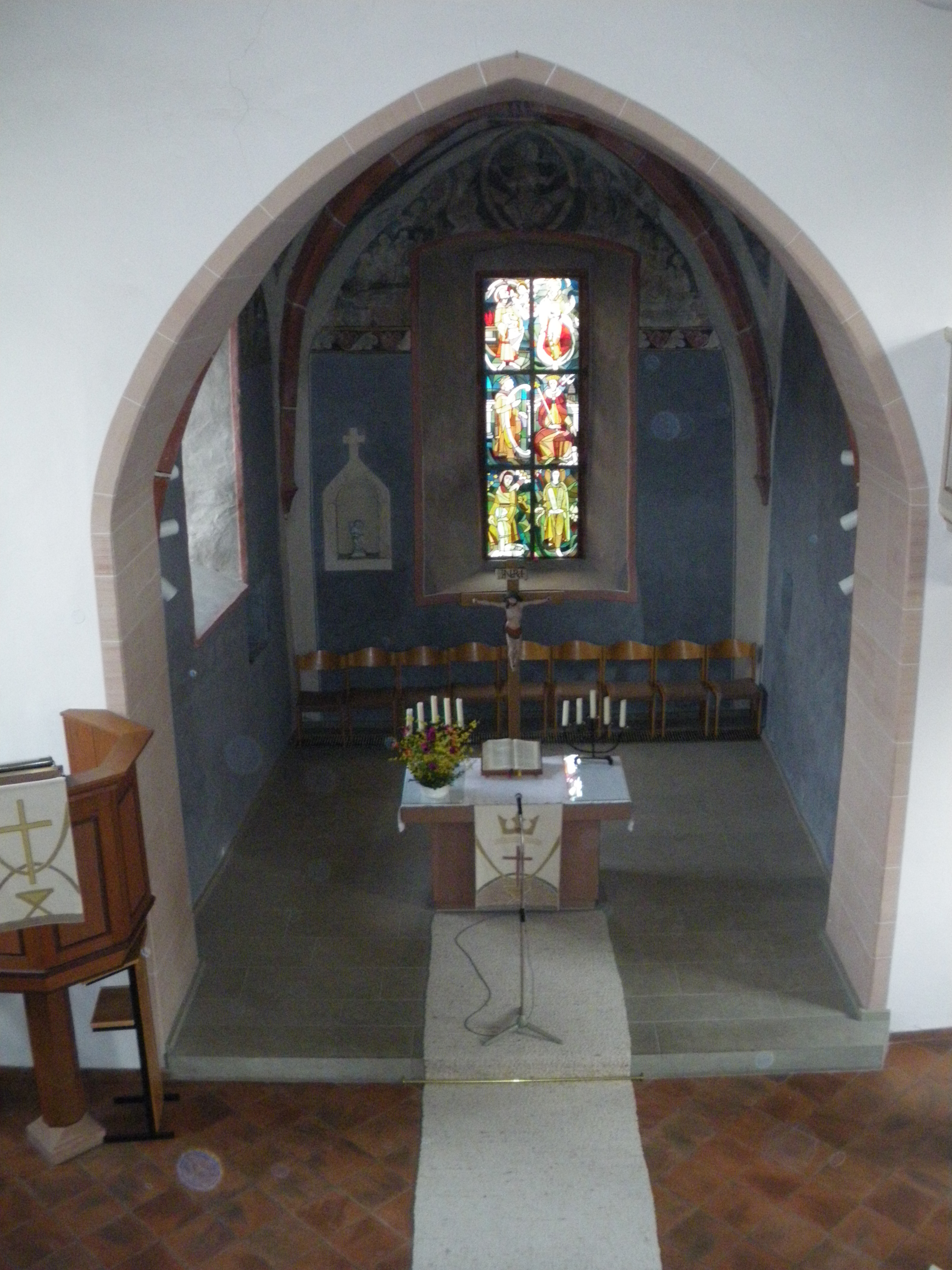 Der Chor der evangelischen Kirche in Ruchsen